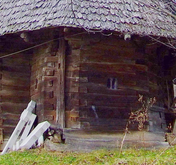 Biserica de lemn din Măgura, judeţul Sălaj.